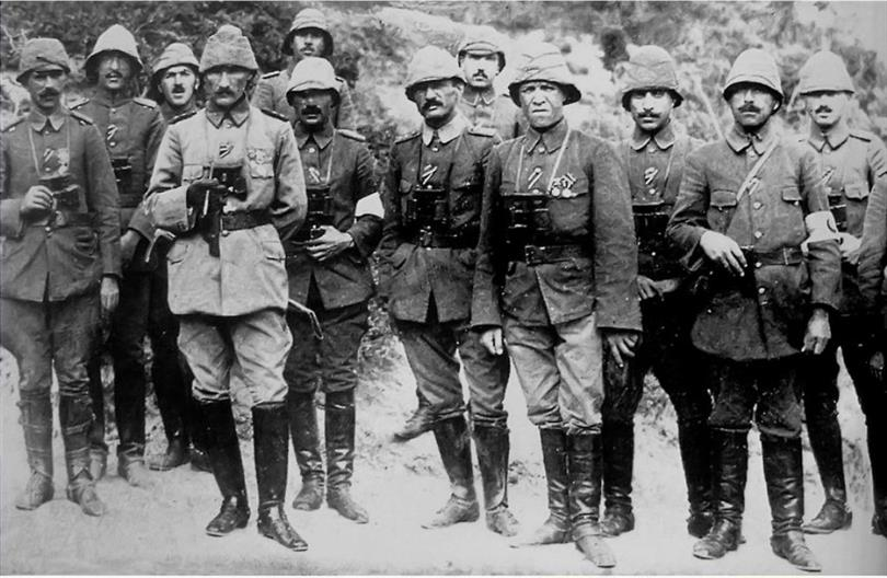 Anafartalar Komutan Gazi Mustafa Kemal ve silah arkadaşları, Çanakkale Savaşı 1915.